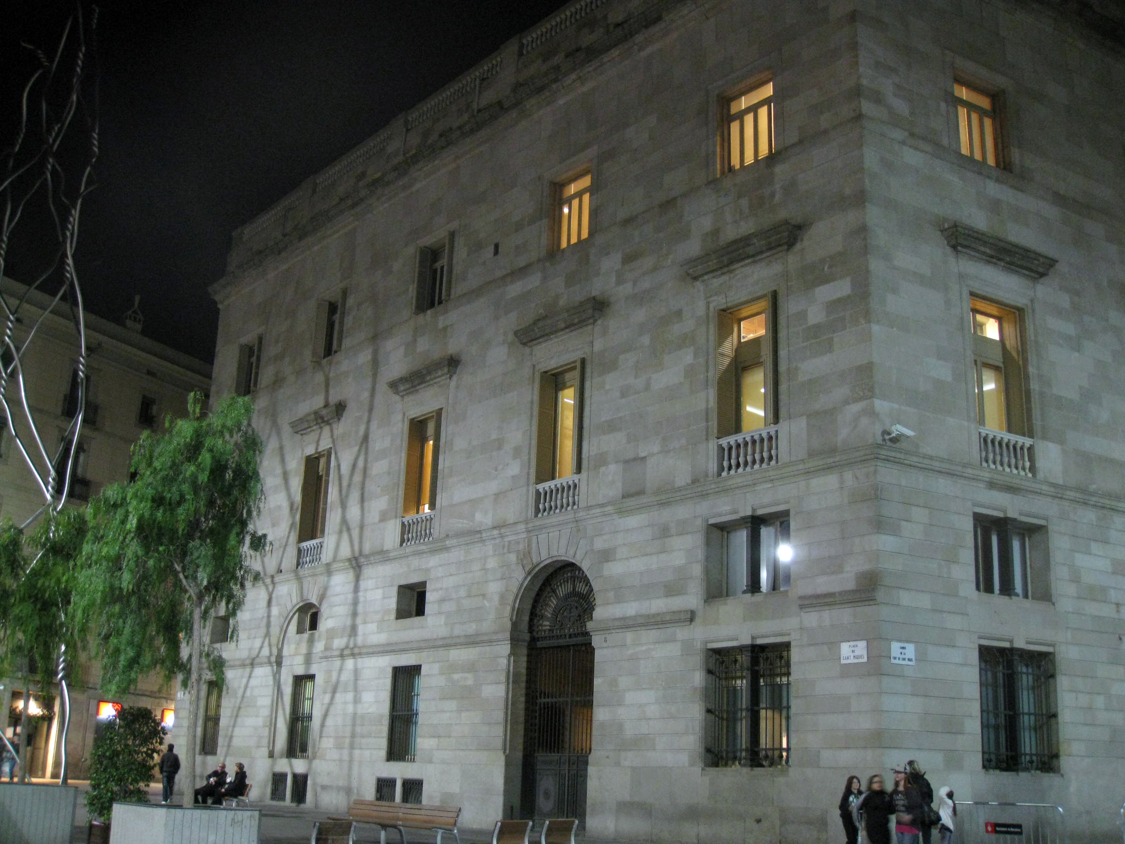 Casa de la Ciutat (Barcelona)